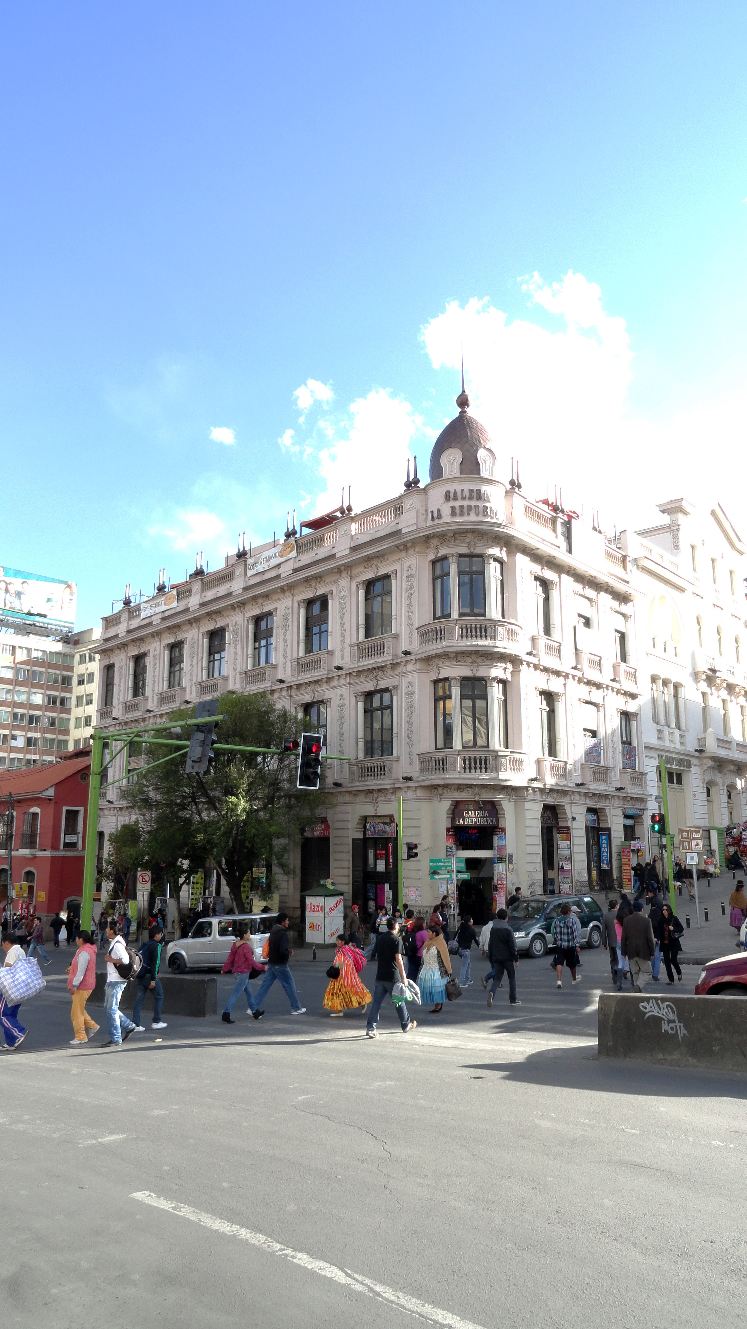 Galería República This medium shows the protected monument with the number L/00-117 in Bolivia.